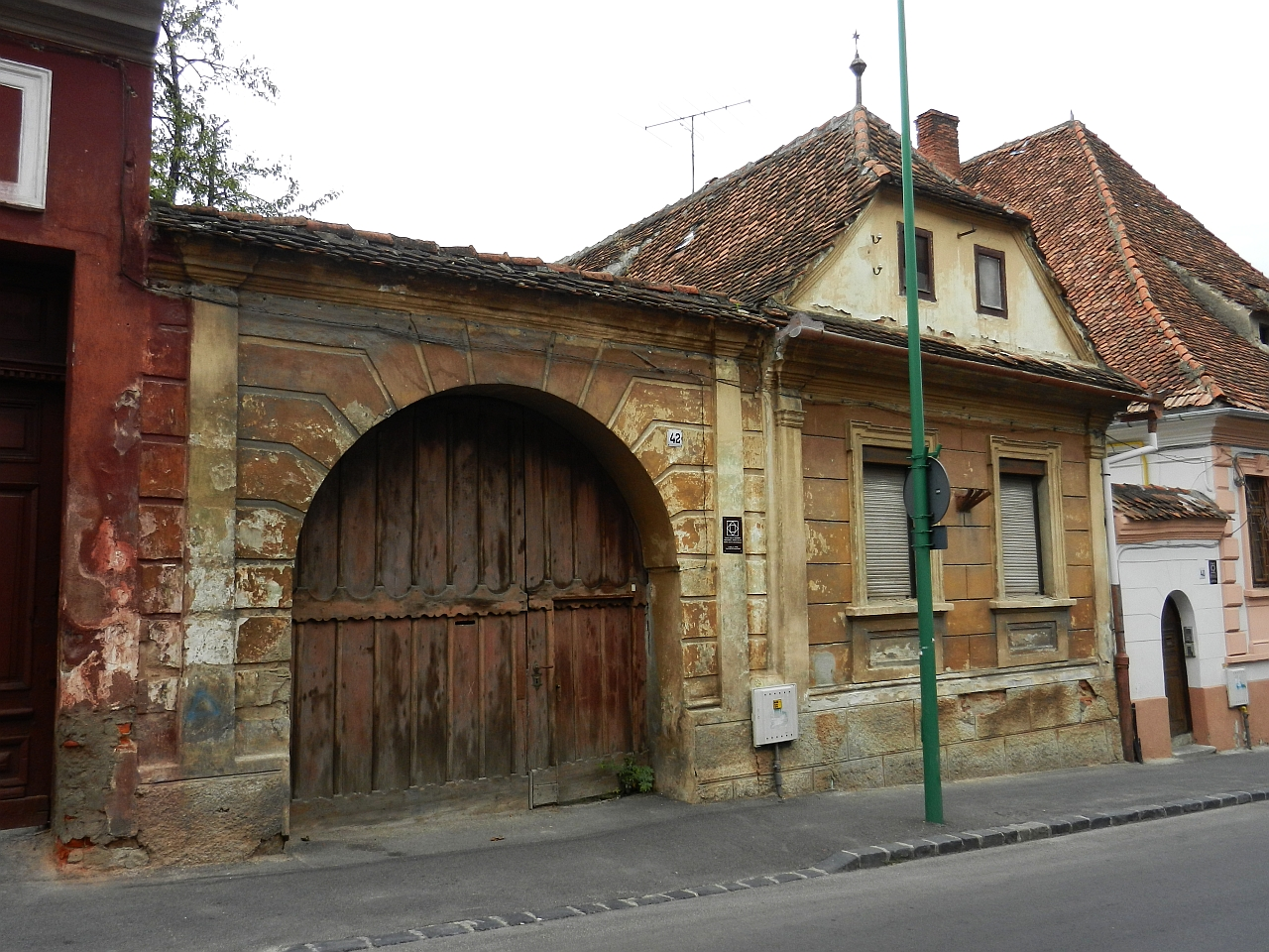 Casă monument istoric